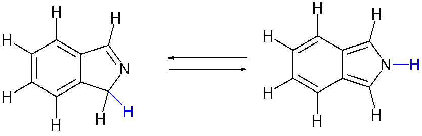 Isoindole tautomerism